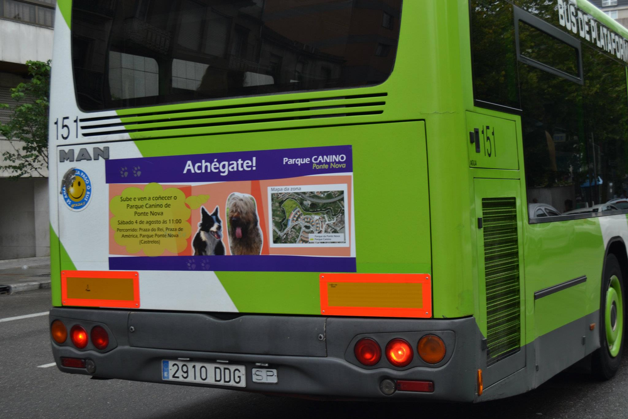 Autobus destinado en Vigo Para el paseo de Perros hasta el parque de Pontenova